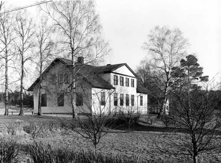 Aspnässkolan i Jakobsberg, Järfälla. 1901 års skolhus. Till höger bakom skolan utedass. Fotoår 1930. Bild nr 01365.